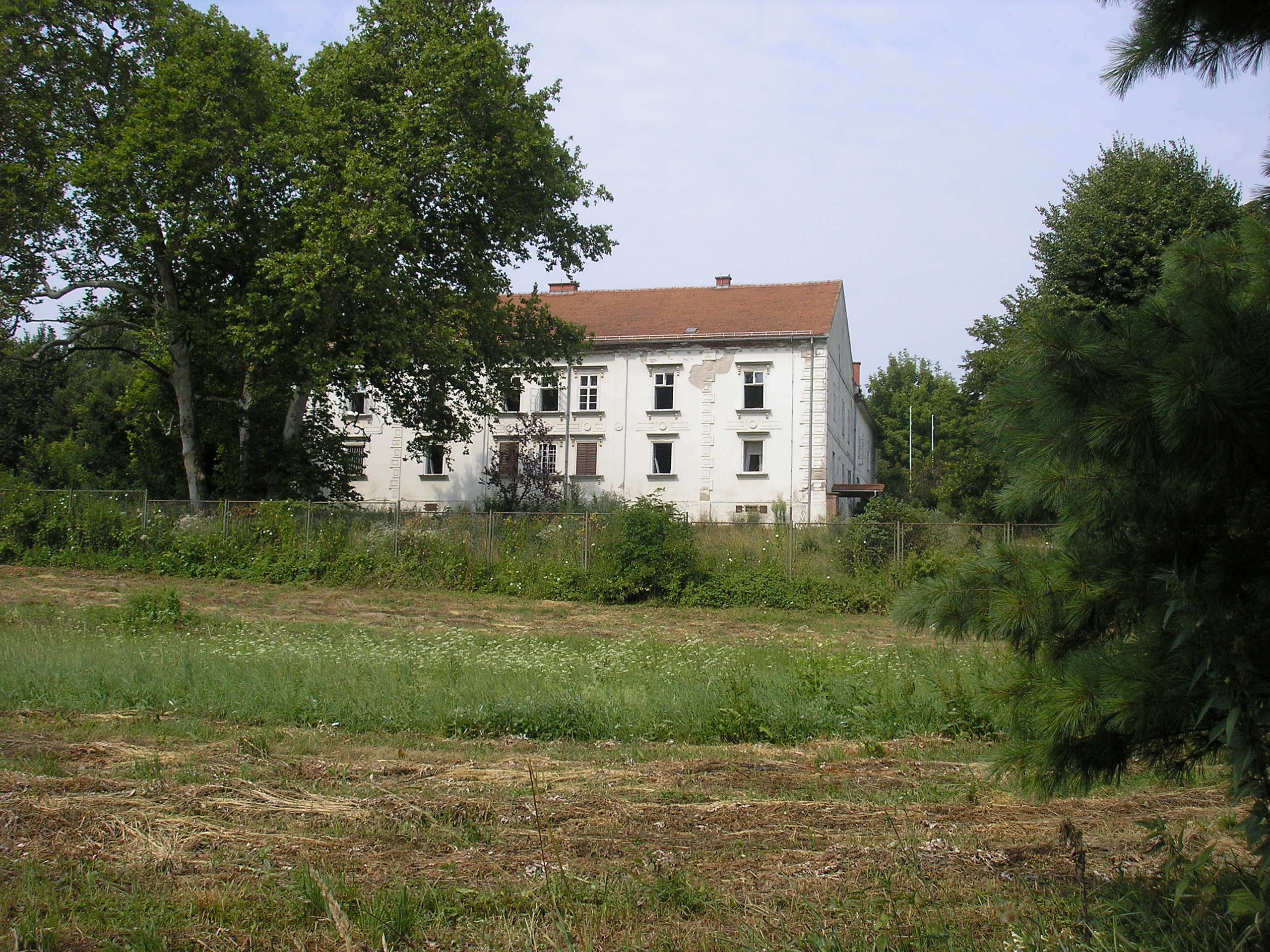 Kereskényi-kastély Vinicán, Horvátország